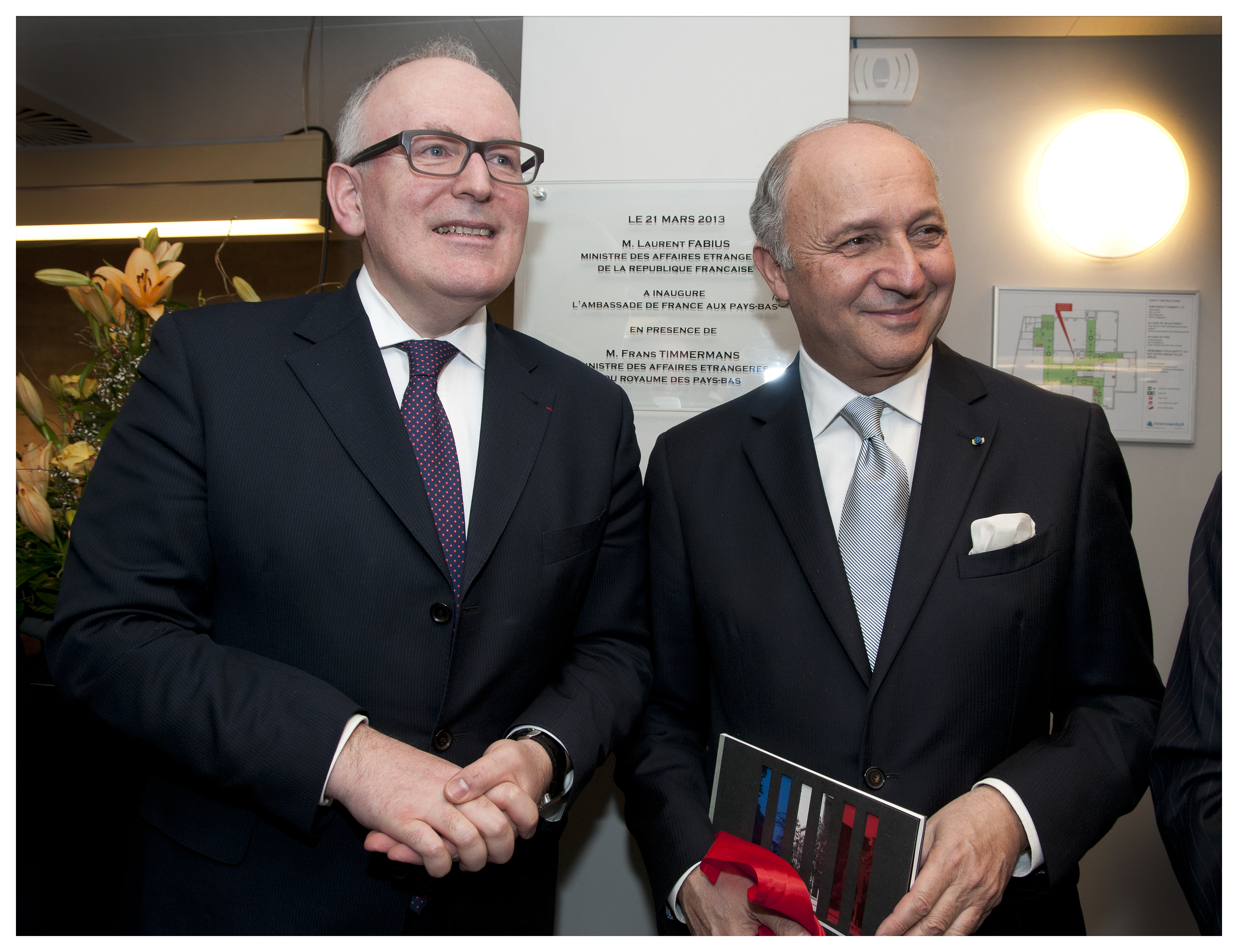 130321 Opening Franse ambassade Fabius en Timmermans 1614